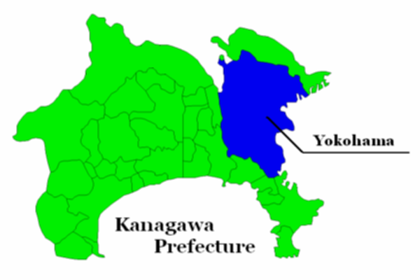 A map of Yokohama(Kanagawa Prefecture, Japan) Mapa Yokohamy (prefektura Kanagawa, Japonia)